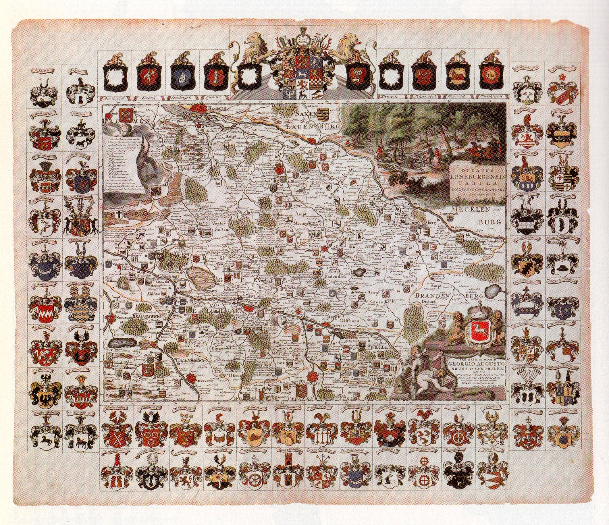 Karte des Fürstentum Lüneburg mit allen Wappen der im Fürstentum begüterten Adelsfamilien. Amsterdam, 1708 von Joseph Mulder